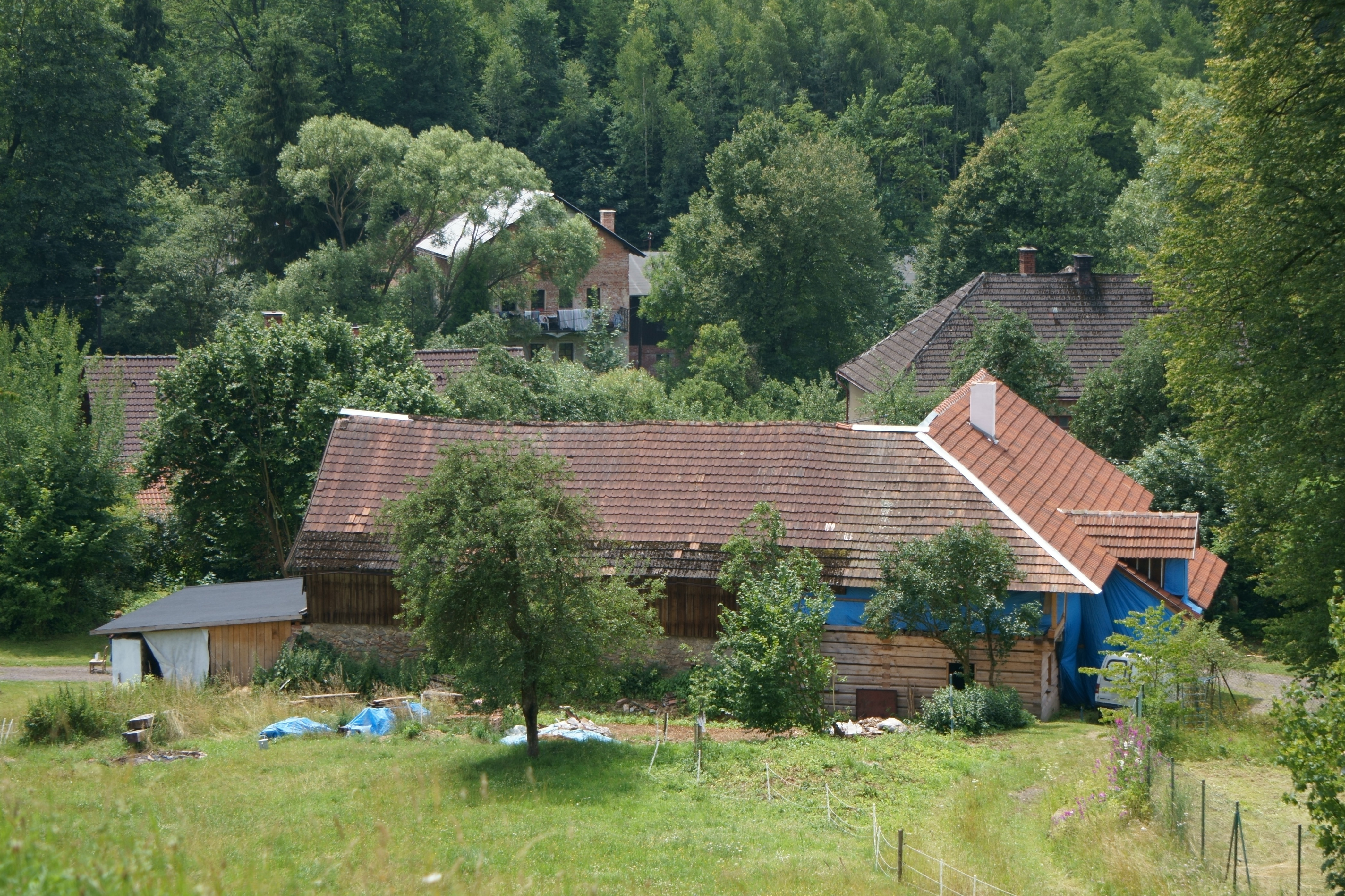 Trávníček če. 14 - detail podstávky. Foceno v průběhu akce Beranovy hody 2017.